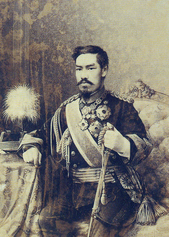 Імператор Мейдзі (портрет)